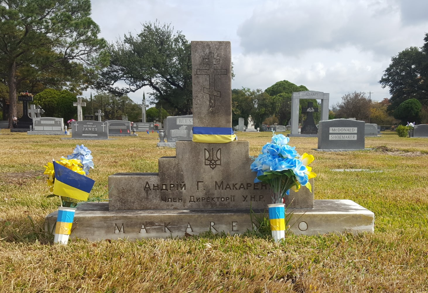 Пам'ятник Андрію Макаренку, який знаходиться на кладовищі Форест Парк в Г'юстоні.